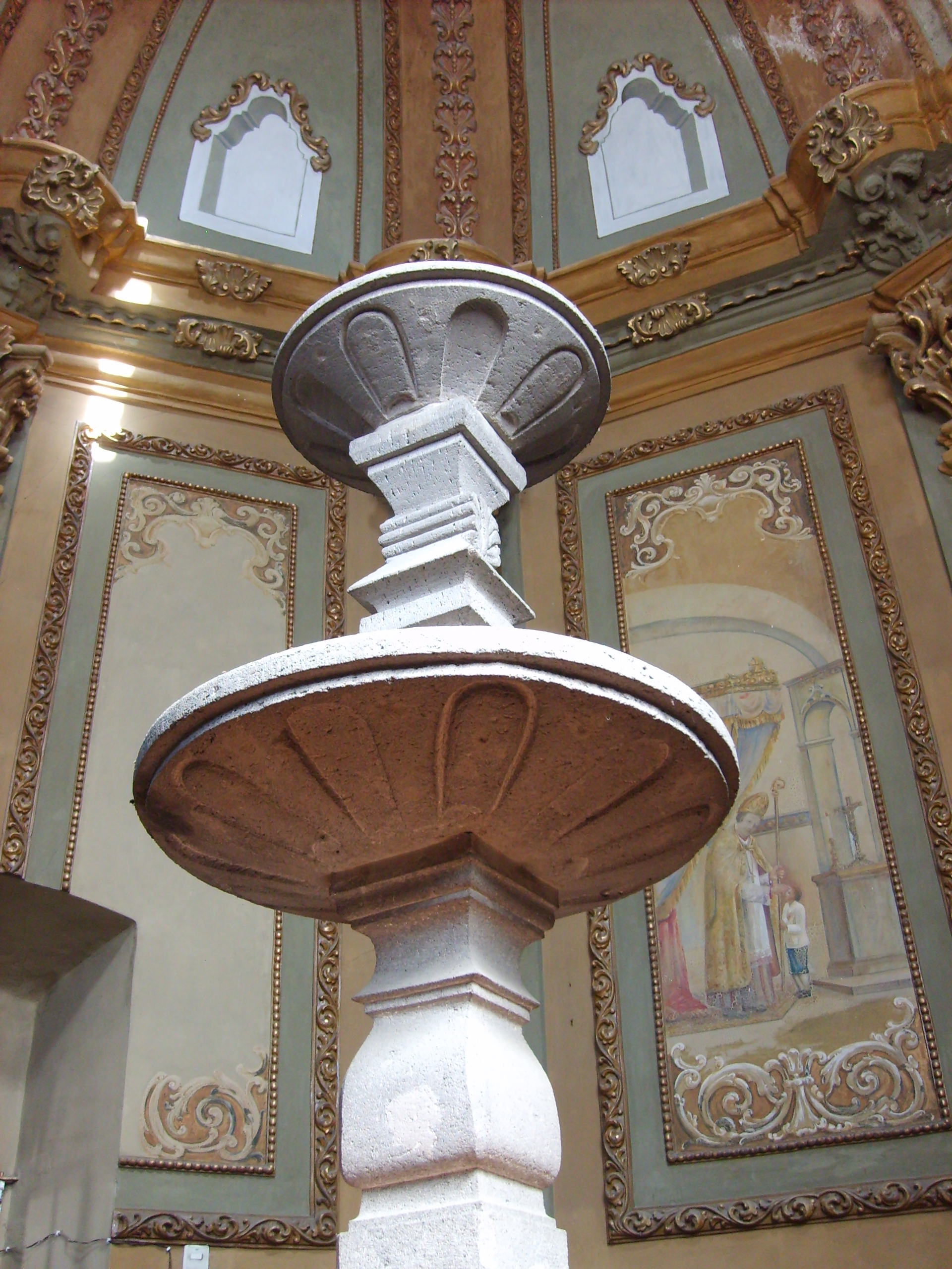 Baptisterio del Templo del Santo Custodio de Analco, Puebla.